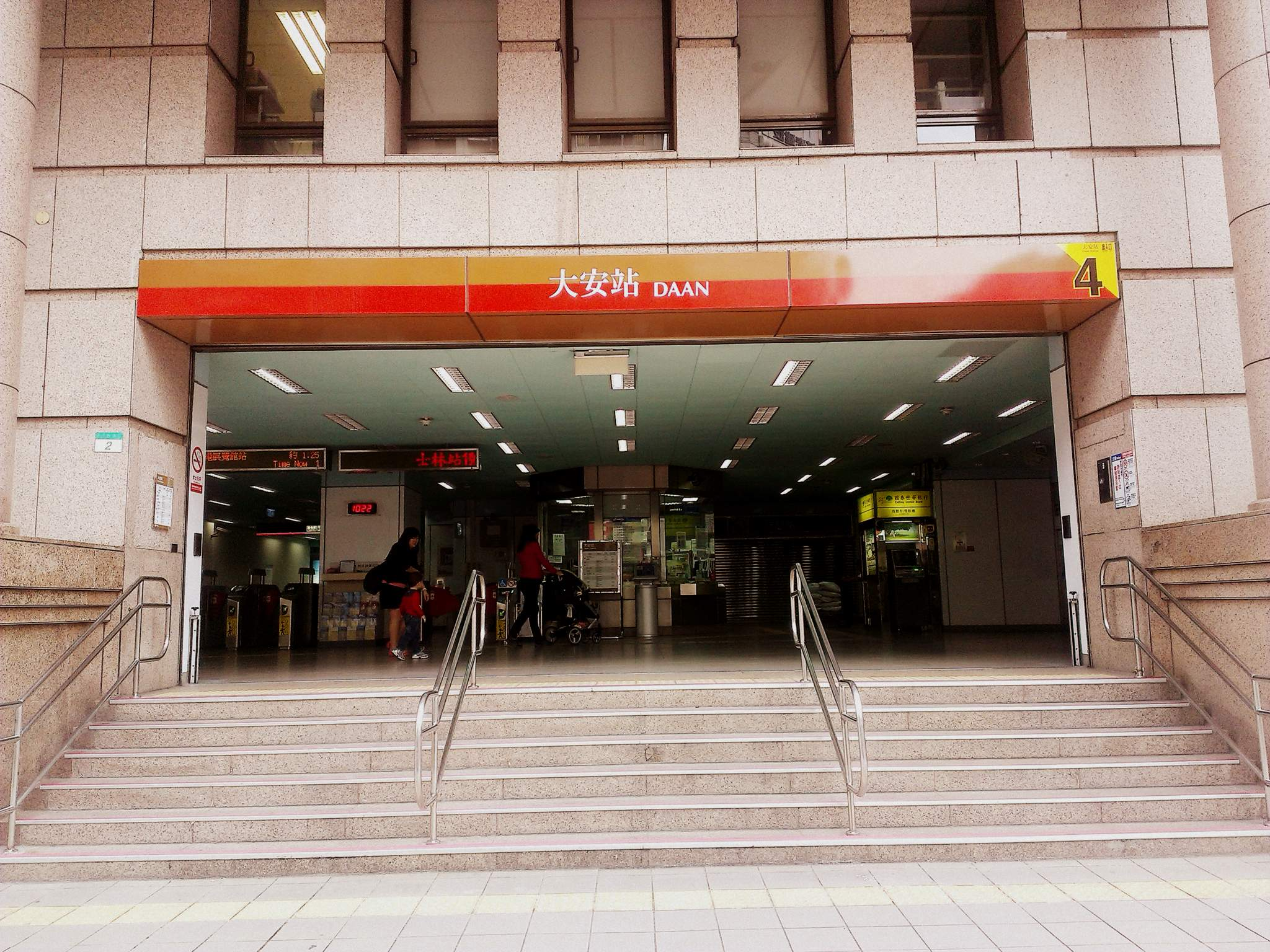 中文（台灣）: 台北捷運大安站位於共構大樓中的四號出口。